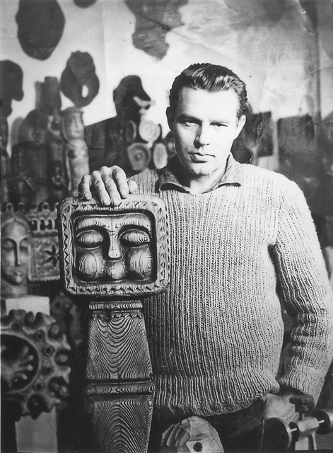 Леонтий Глущенко в своей мастерской, среди своих работ 1972 г.